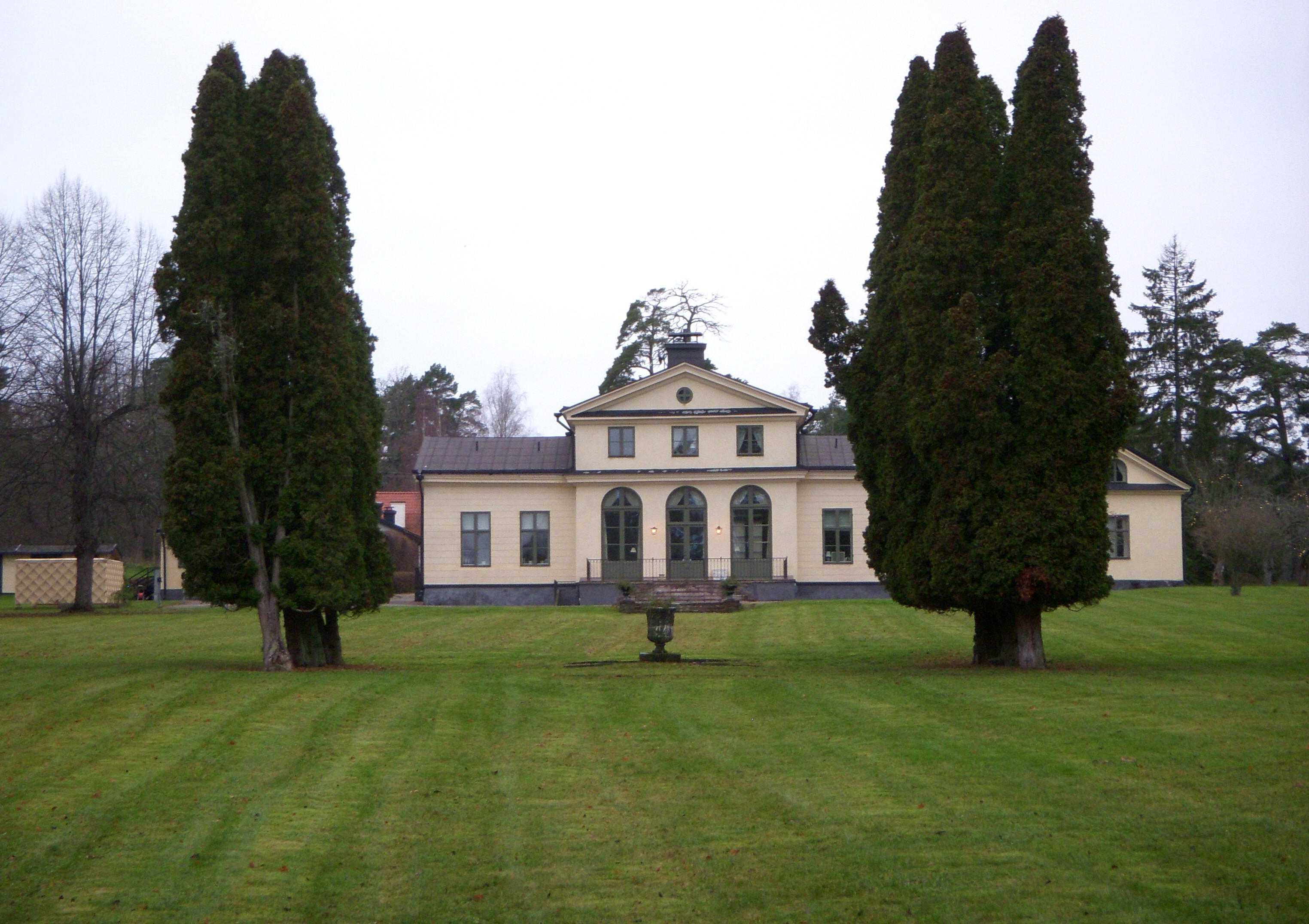 Byggnaden "Vilan" på Drottningholm, arkitekt Louis Jean Desprez, 1792